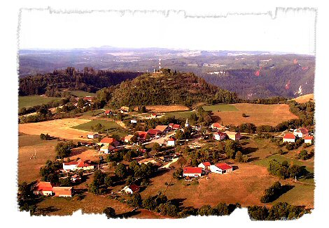 Vue aérienne de Montmahoux